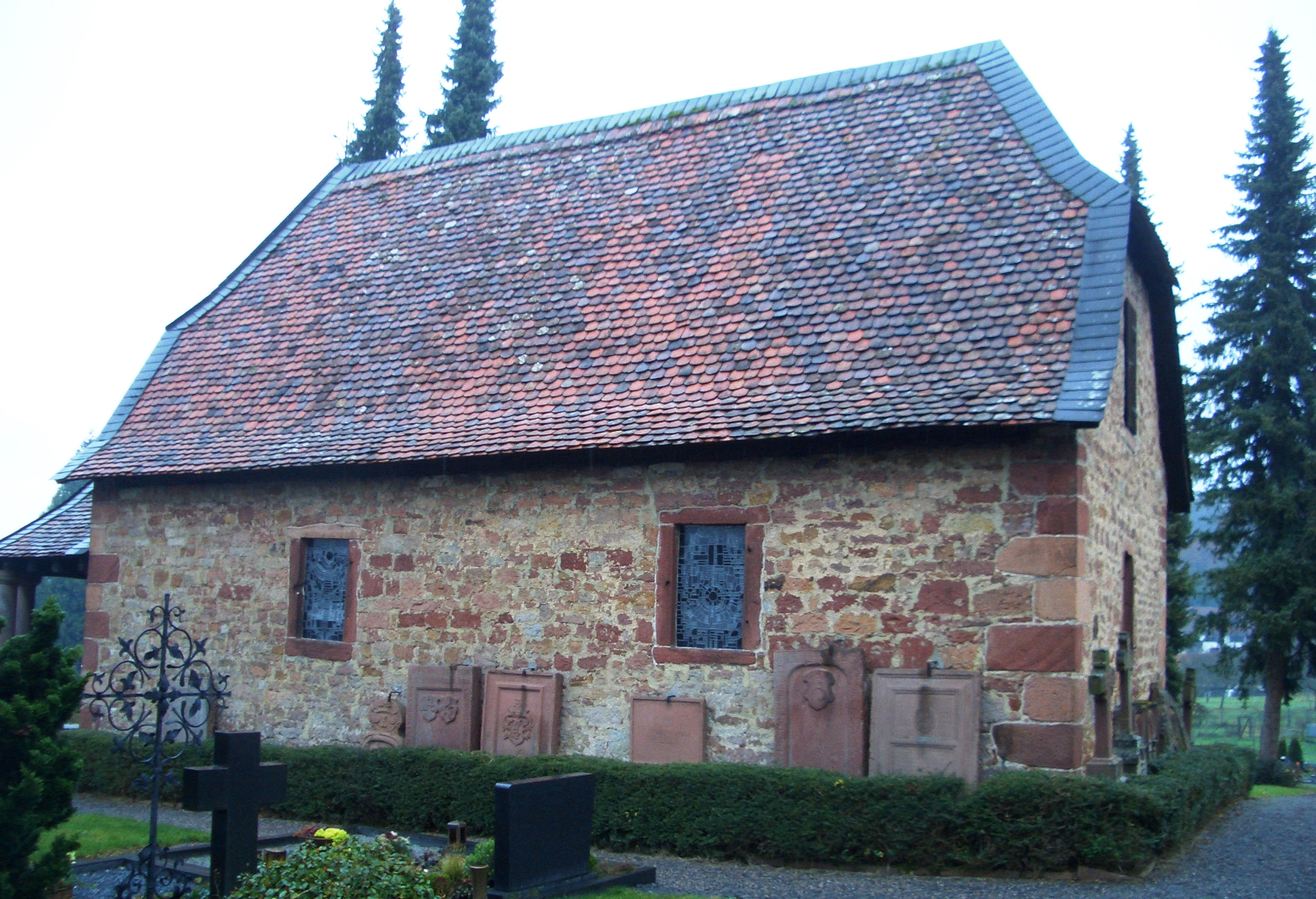 Heilig-Kreuz-Kapelle Michelstadt Ostseite